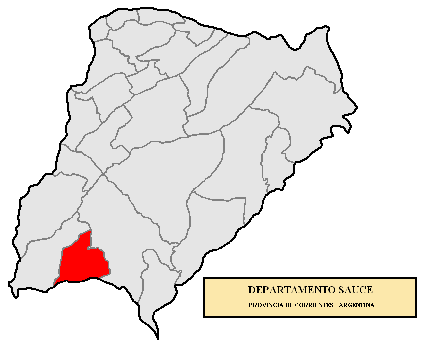 Localización del Departamento Sauce, en la provincia de Corrientes, Argentina.